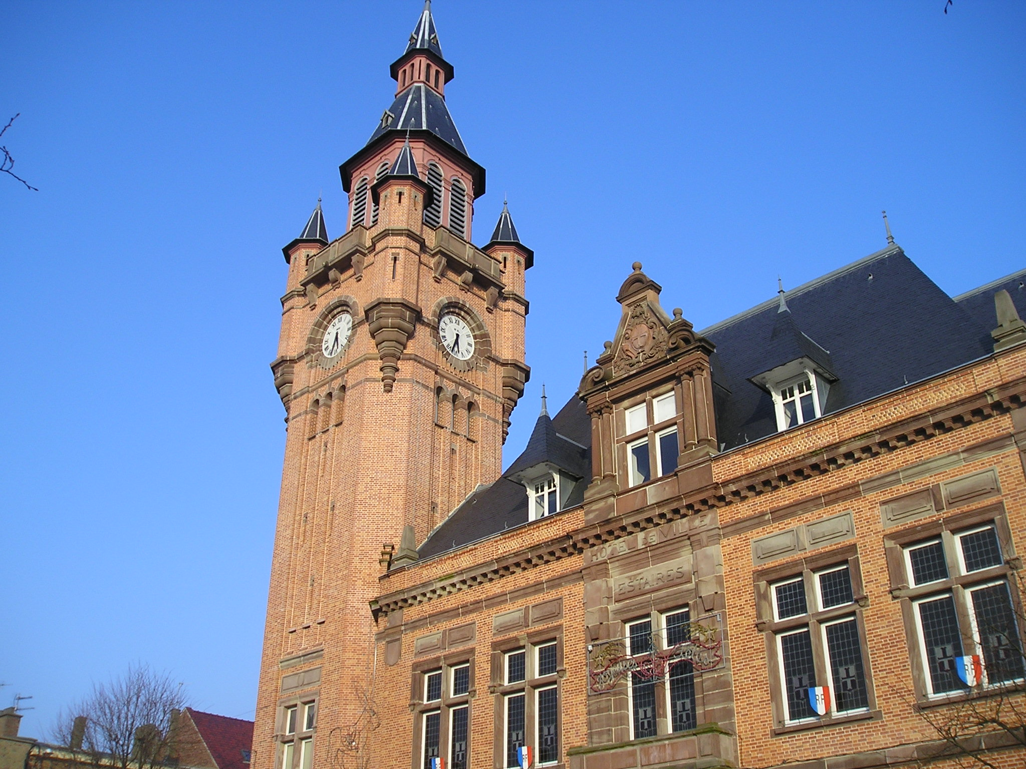 Le beffroi et l'hôtel de ville d'Estaires, Nord, France.